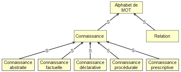 Alphabet de MOT